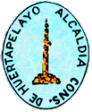 HPEscudoTransparencia2